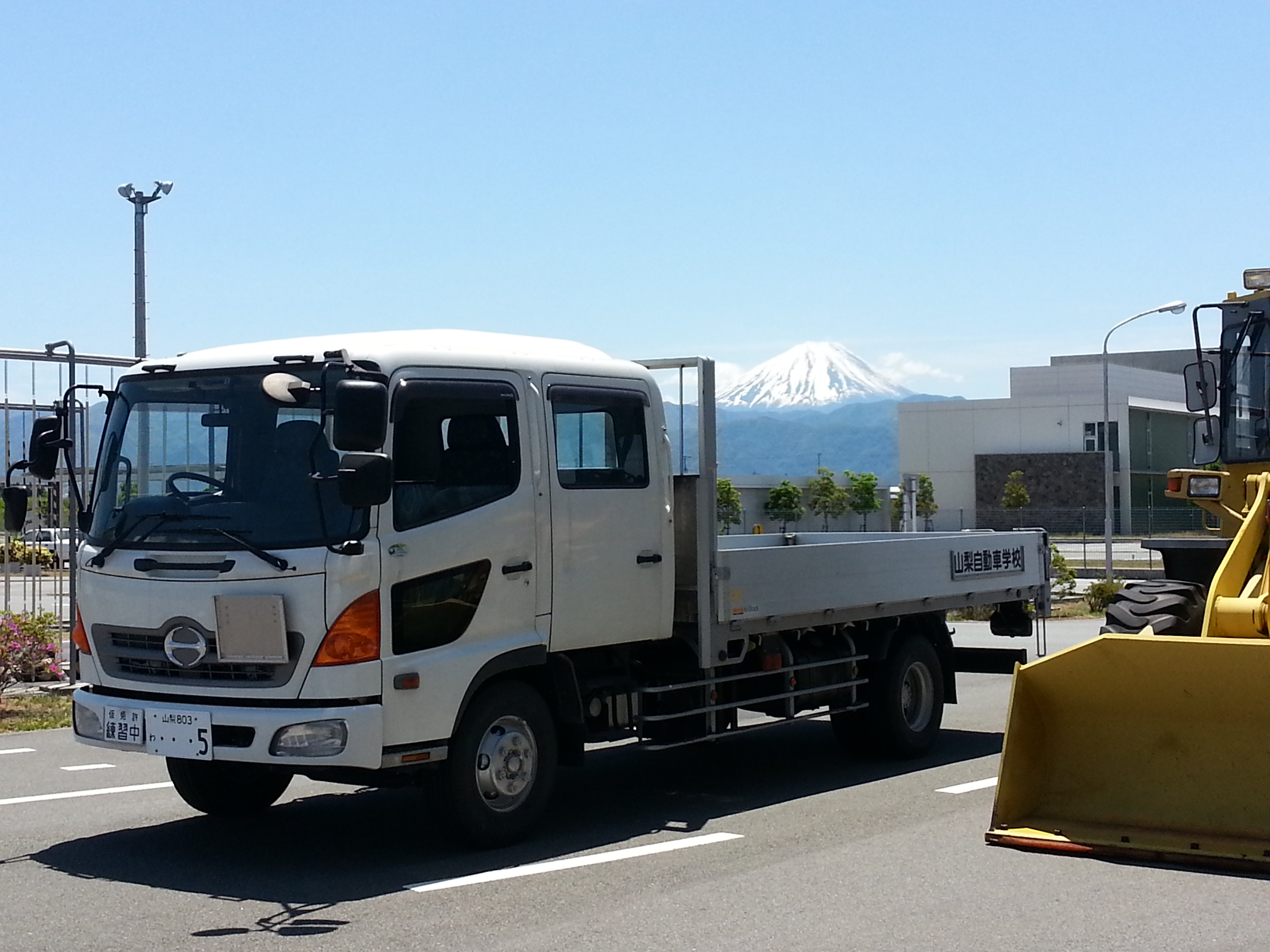 日野レンジャー5.5t増トン車ベースの中型教習/試験車です。